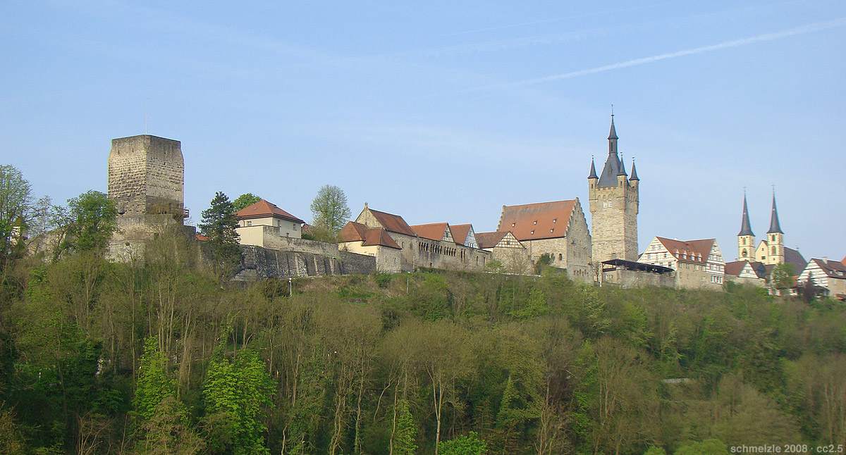 Silhouette des östlichen Altstadtbereichs (ehemalige Pfalz) von Bad Wimpfen. Links der Rote Turm, daran anschließend die Palas-Arkaden, das Steinhaus und der Blaue Turm. Ganz rechts die Türme der westlich der Pfalz gelegenen Stadtkirche.